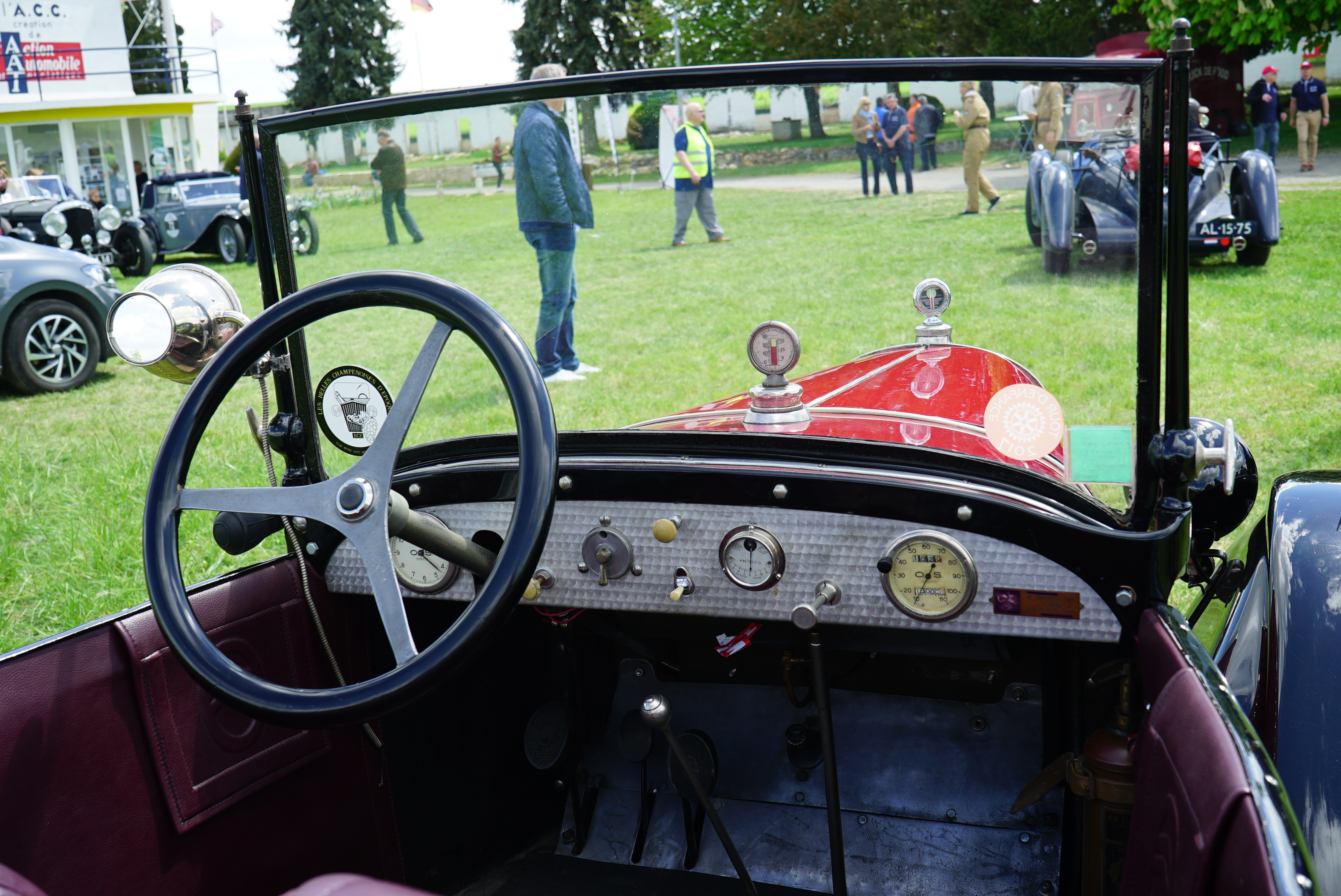 lors de la Course Paris-Amsterdam, 2018 sur le circuit de Gueux.